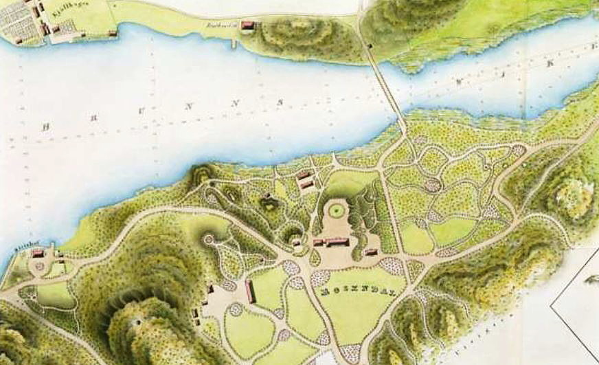 Karl XIV Johans lustpark med bron över Djurgårdsbrunnsviken